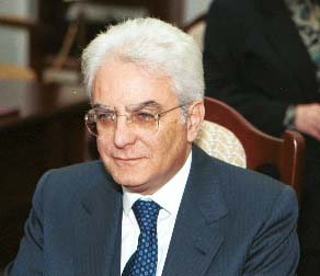 Sergio Mattarella